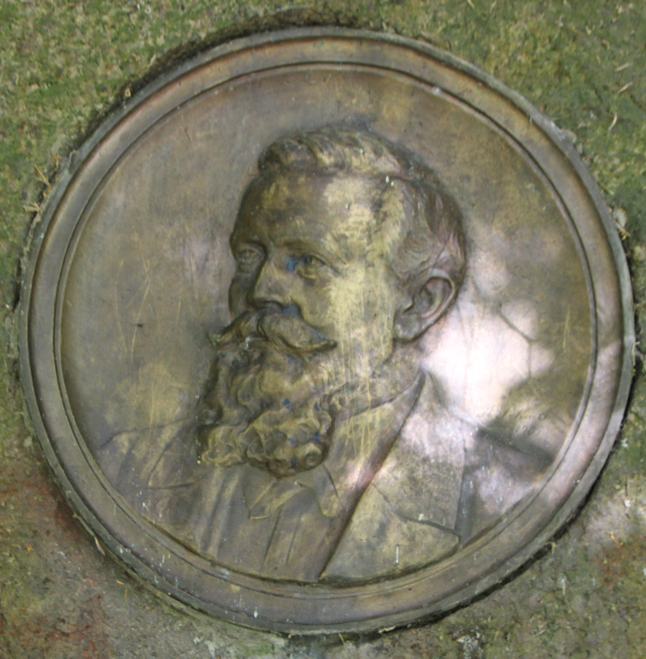 Der Sachsen-Anhalt-Tag 2015 in Köthen. Sachsen-Anhalt-Tag 2015